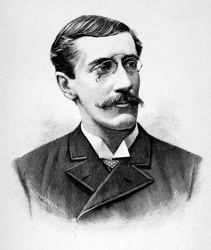 Porträtt av Edvard Fredin